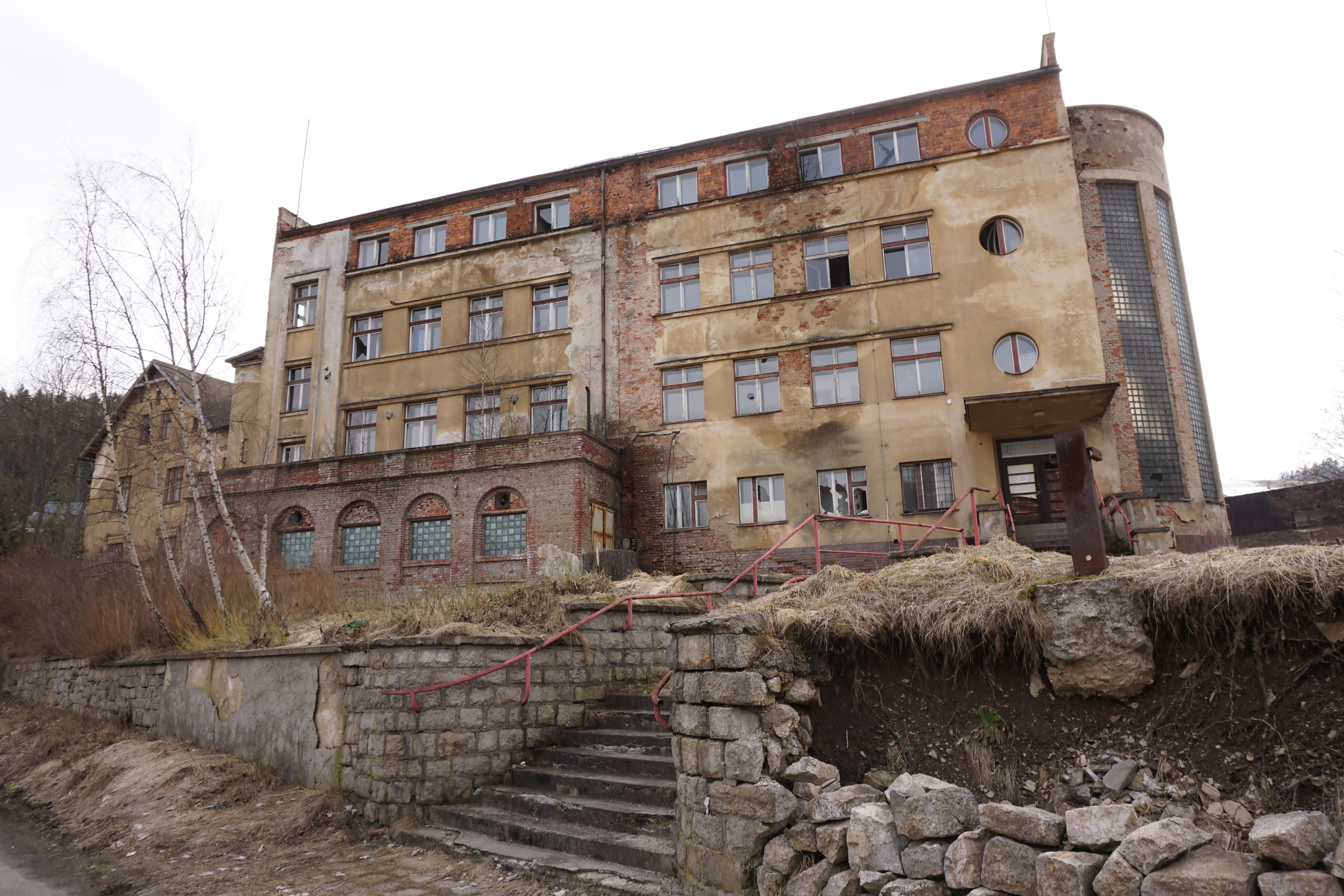 Administrativní a společenská budova Brůnovy továrny, Plavy 112, Plavy.